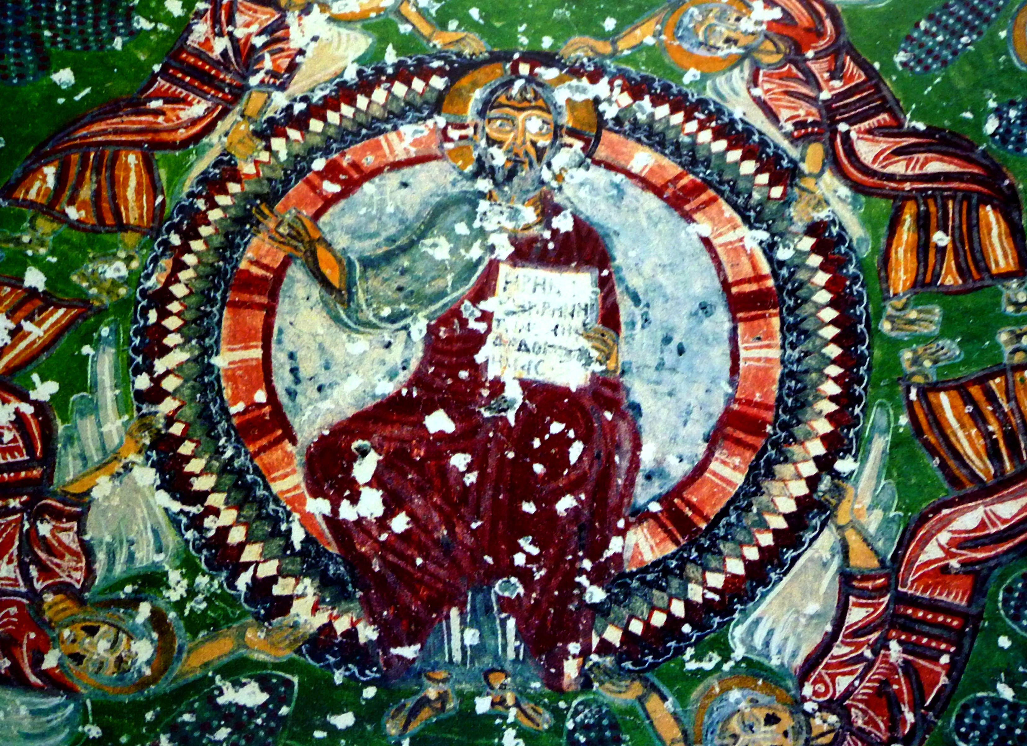 Kappadókia/Göreme Nemzeti Park: Kokar-templom (Kokar Kilise)